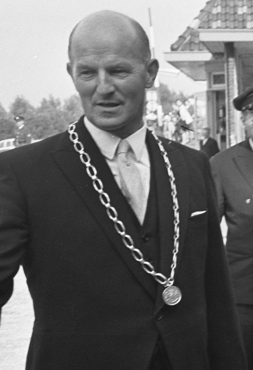 De prins wordt verwelkomd door burgemeester Den Hollander